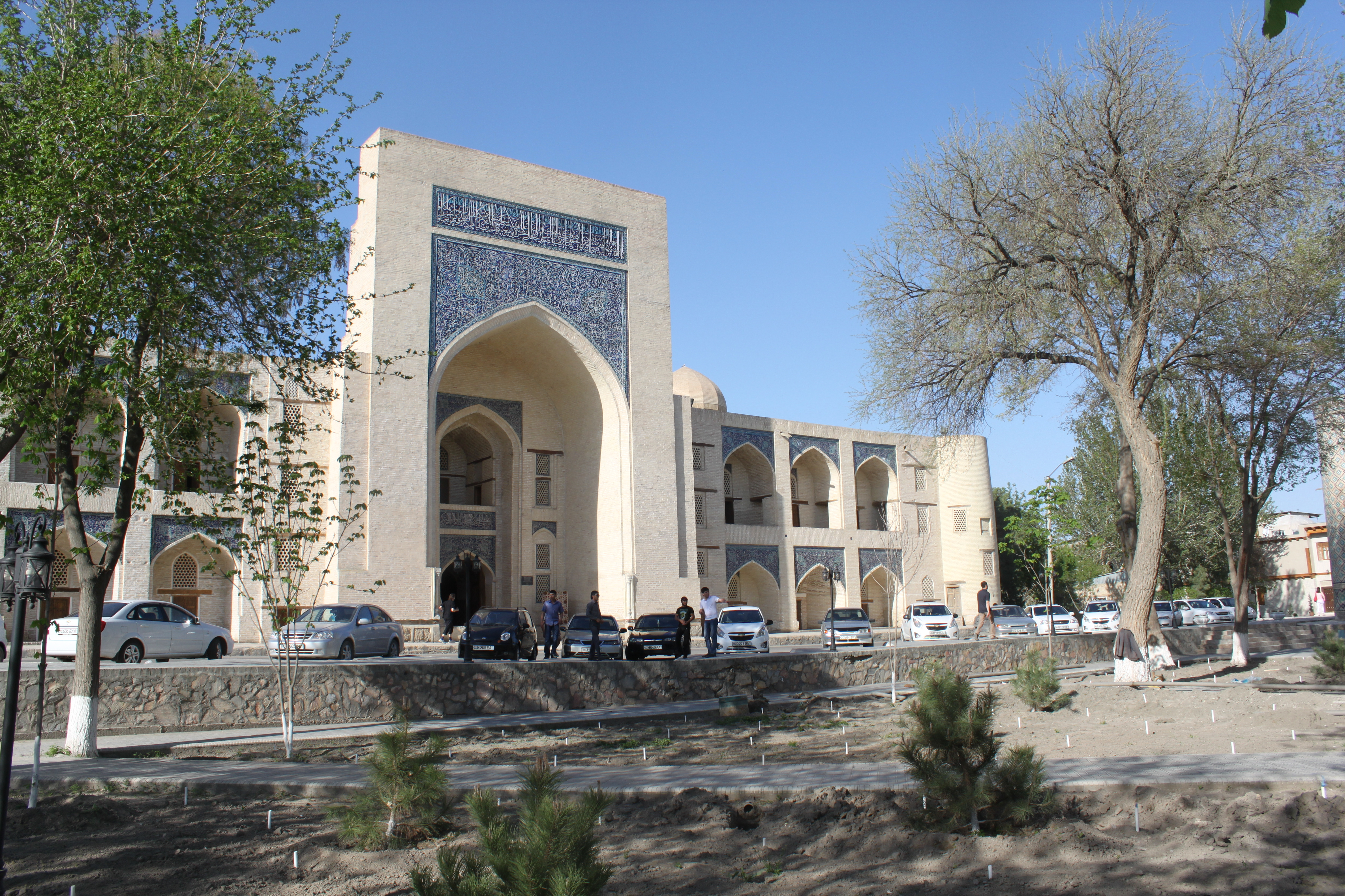 Façade de la madrasa Koukledach